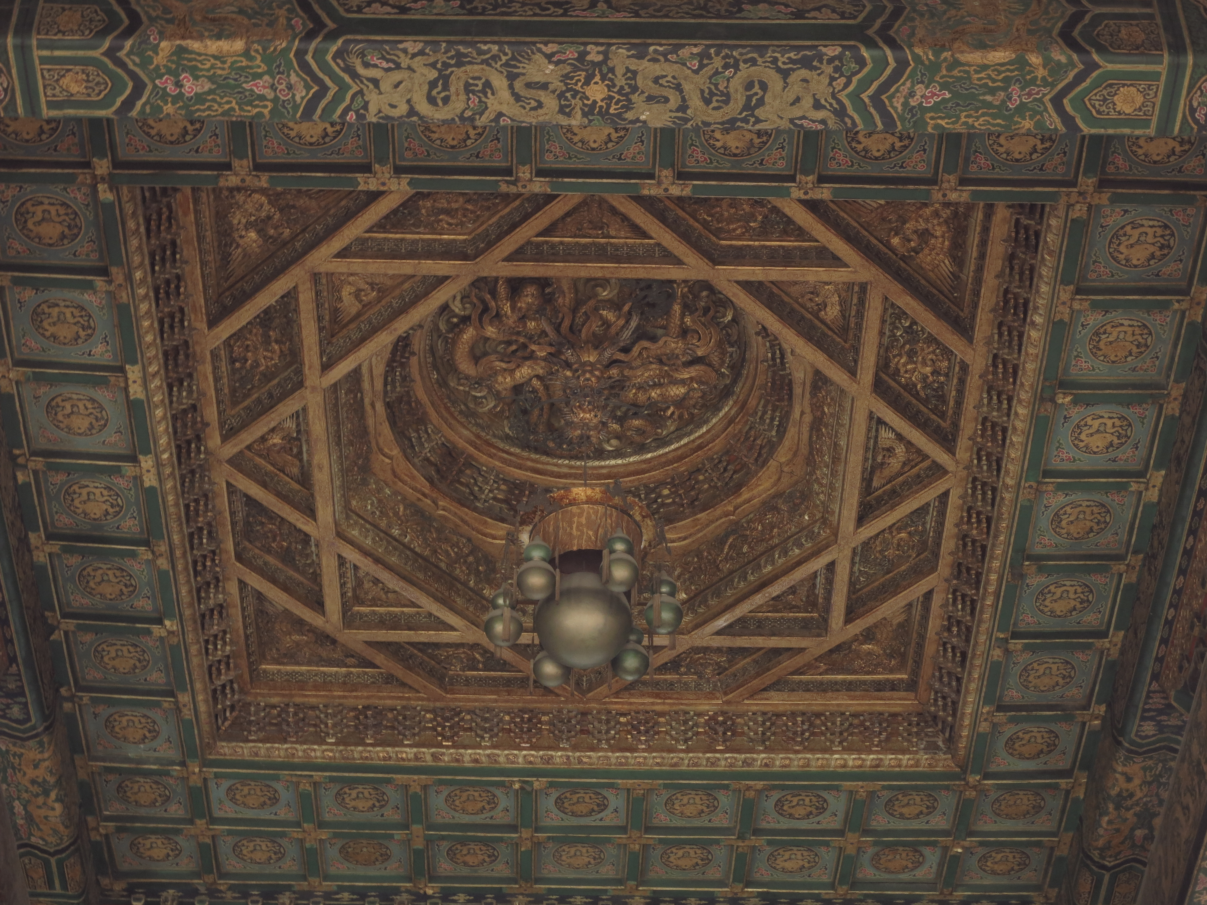 故宮太和殿內正中的藻井和軒轅鏡